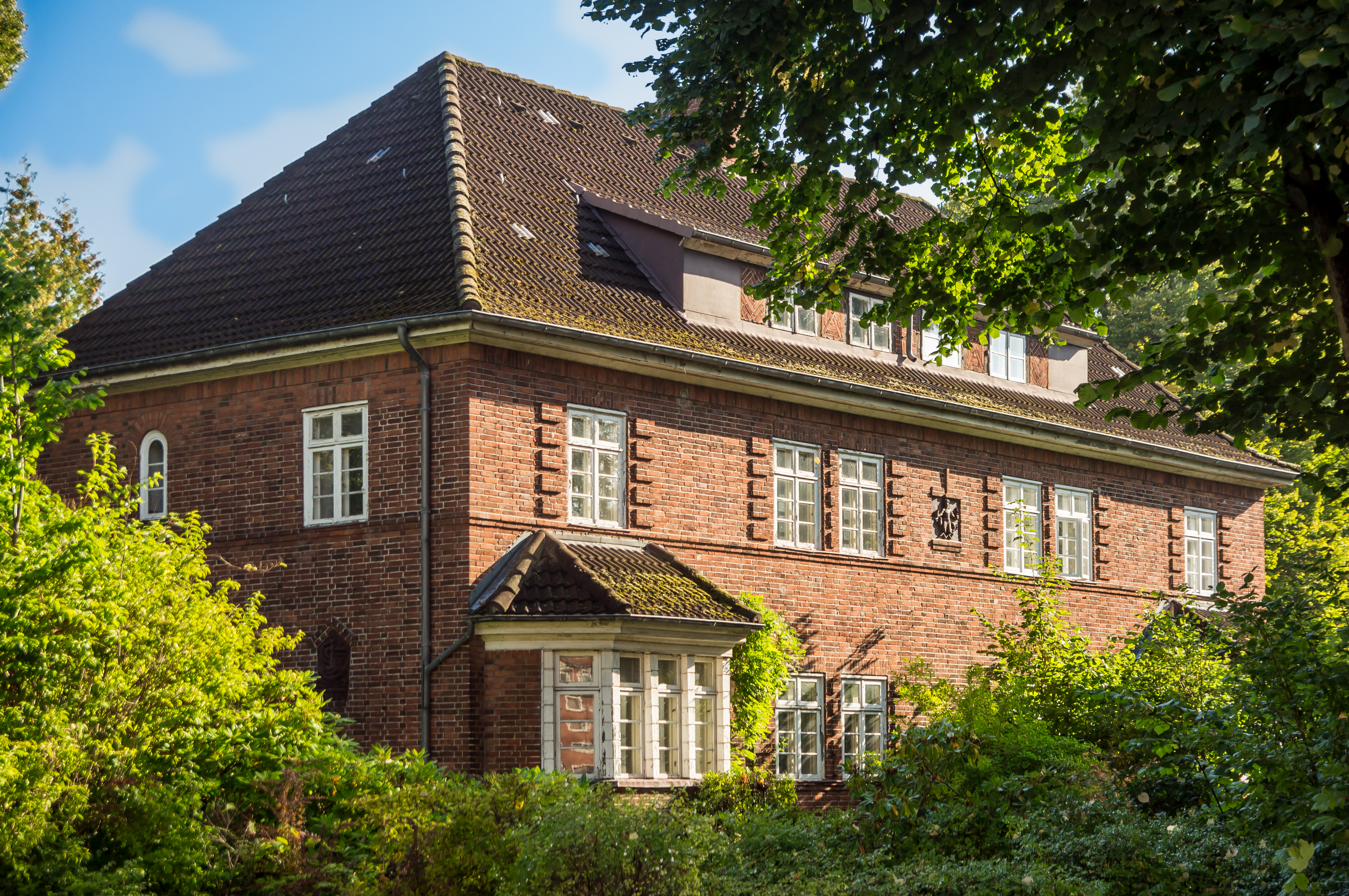 Flensburg-Mürwik, Kelmstrasse 2, Doppelhaus, Denkmal-Nr. 5. Das Ostende des Gebäudes hat die Adresse Fördestraße 1 und ist als Denkmal-Nr. 1 in der Liste Flensburg-Mürwik eingetragen. Zwischen den Haushälften befindet sich an der Aussenmauer im 1. OG eine Wandverzierung die eine Meerjungfrau o.ä. zeigt. An der Aussenmauer der Ost- und Westenden befindet sich je eine Verzierung die einen Anker und das Jahr 1926 zeigt.